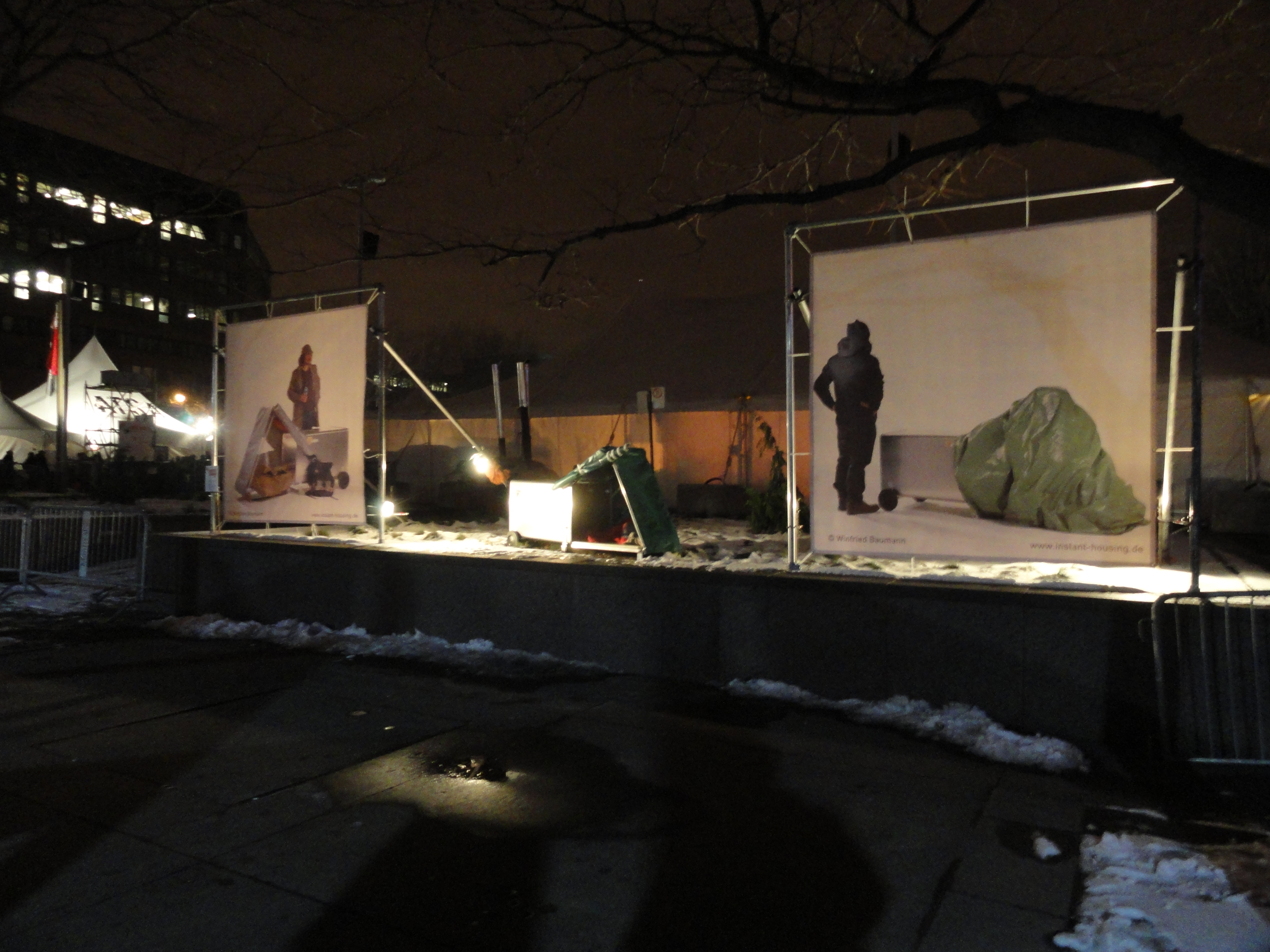 Montréal,Oeuvre de Winfried Baumann, État d'Urgence 2010, Place Émilie-Gamelin